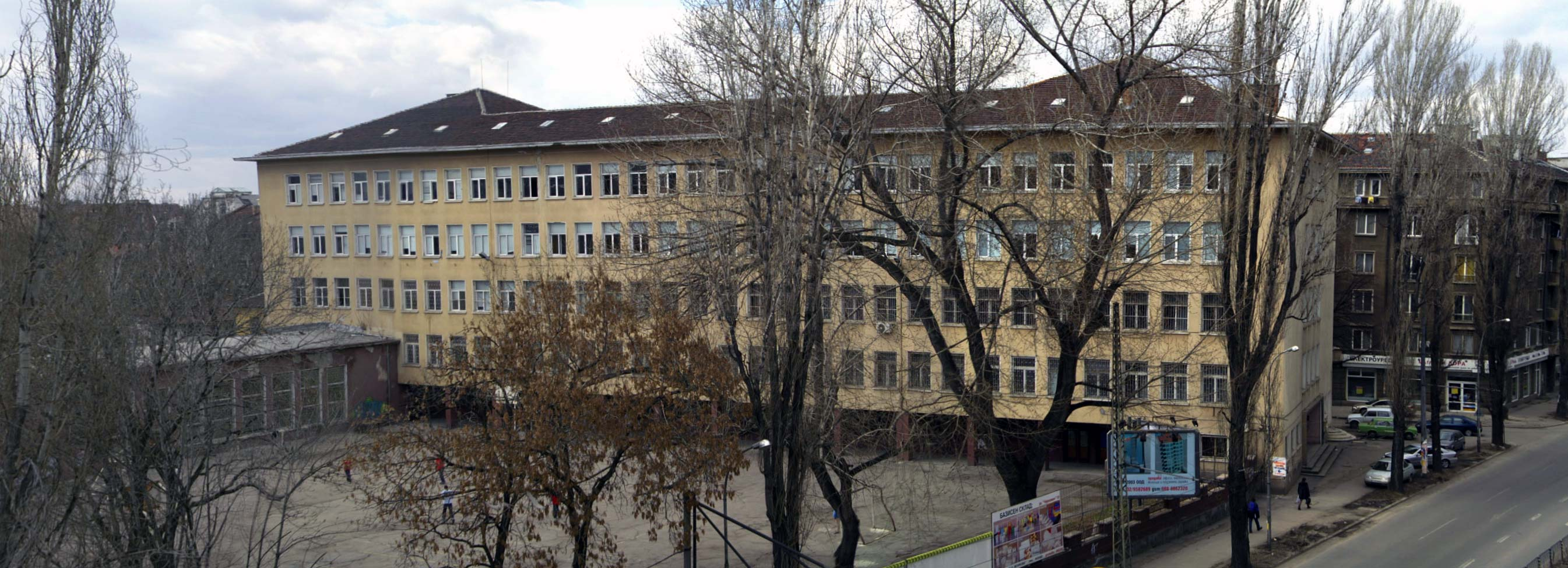 Панорамен поглед Софийската математическа гимназия. Template:Картинка инфо